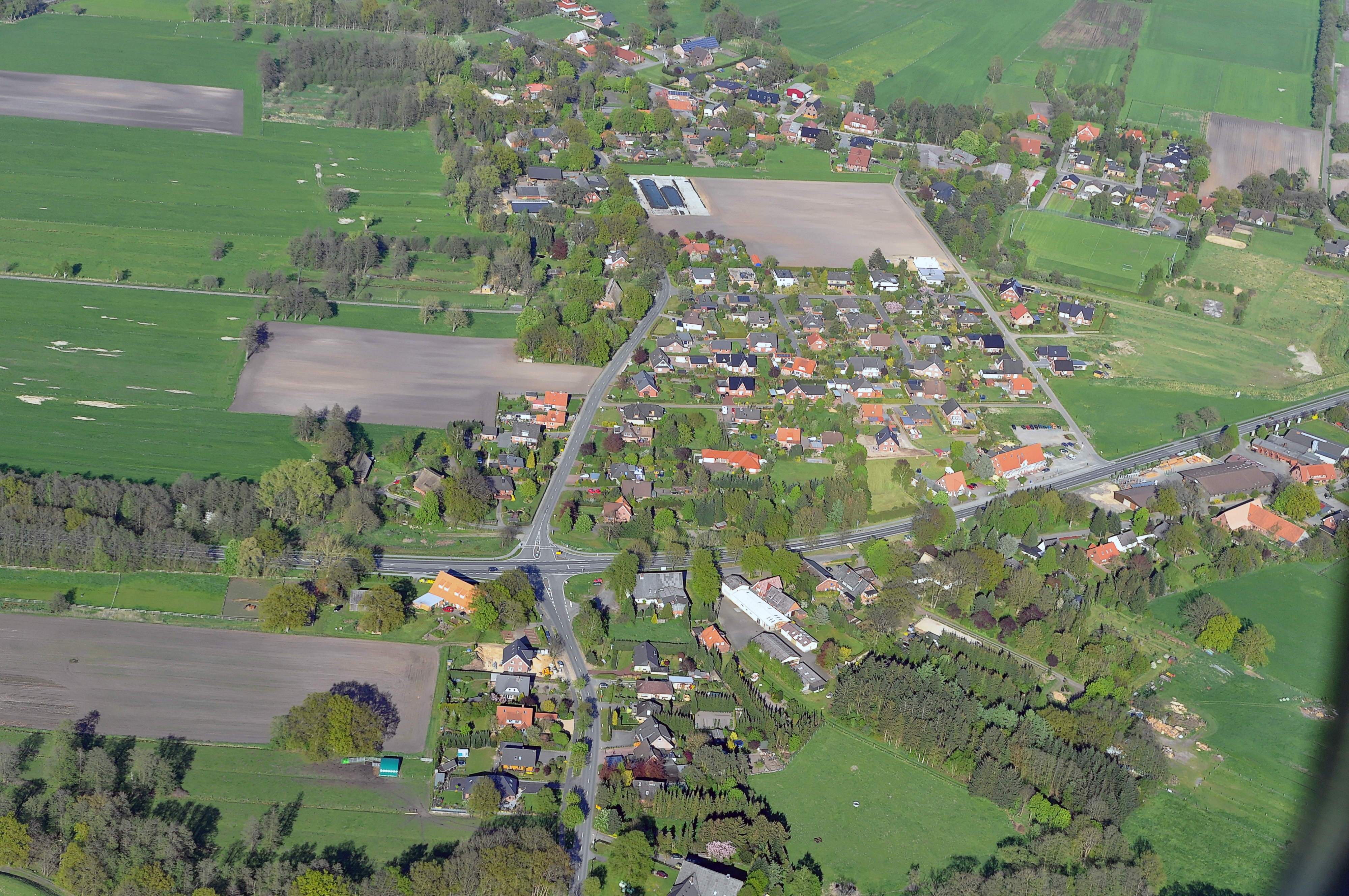 Luftbilder von der Nordseeküste 2012-05